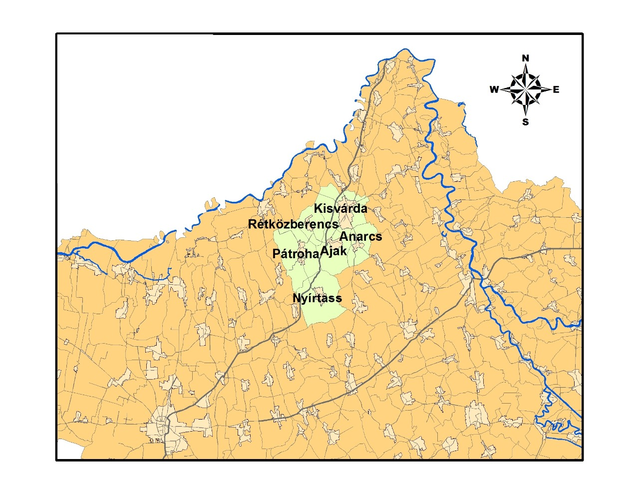 Az Ajaki Tűzoltó Egyesület beavatkozási területe